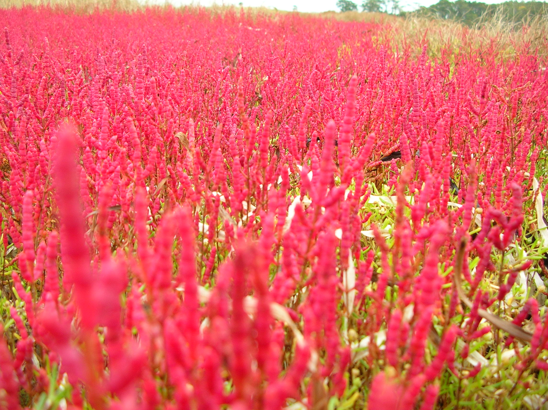 サンゴ草（Glasswort,Lake Saroma）